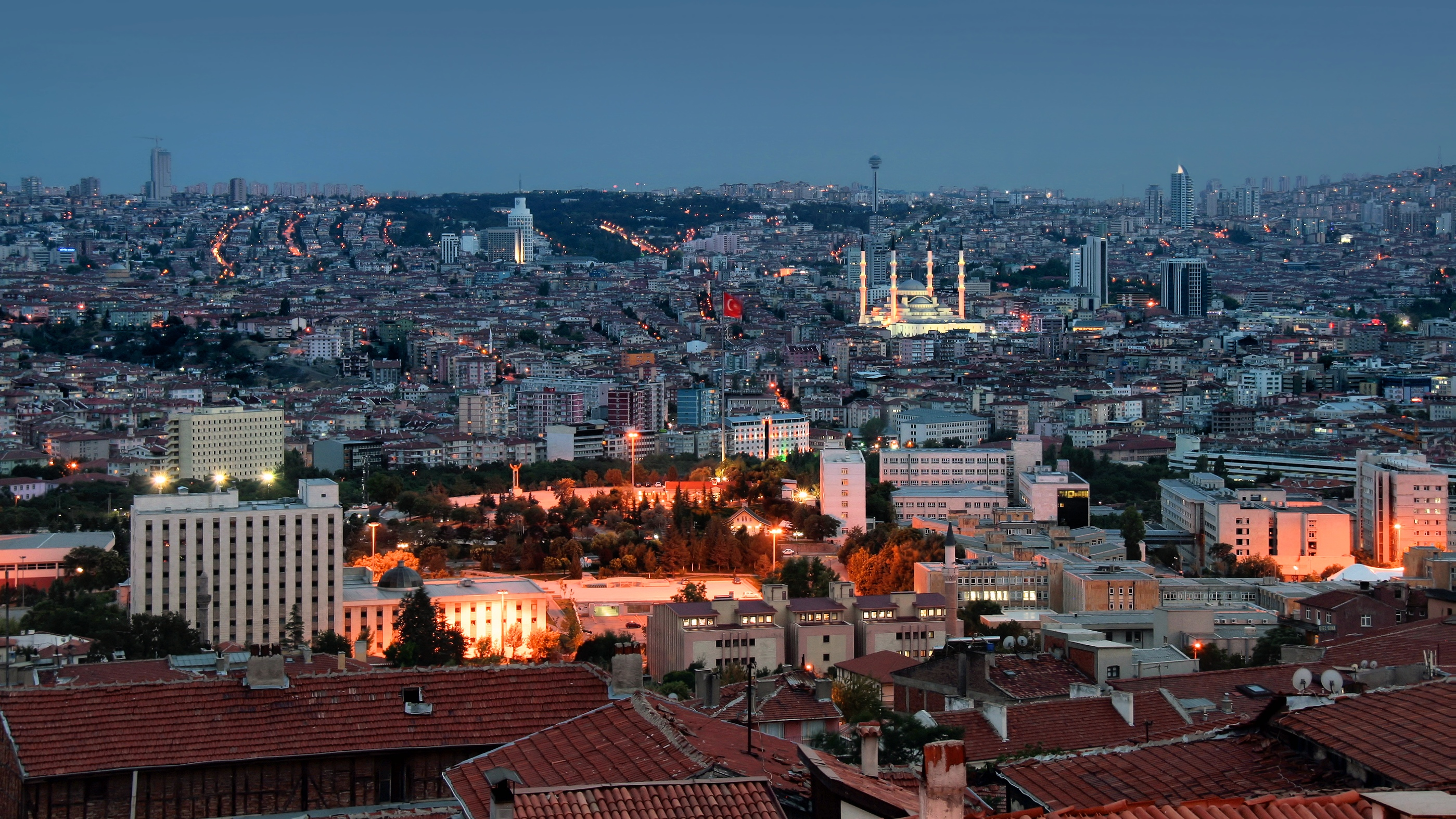 Ankara (Turkey)